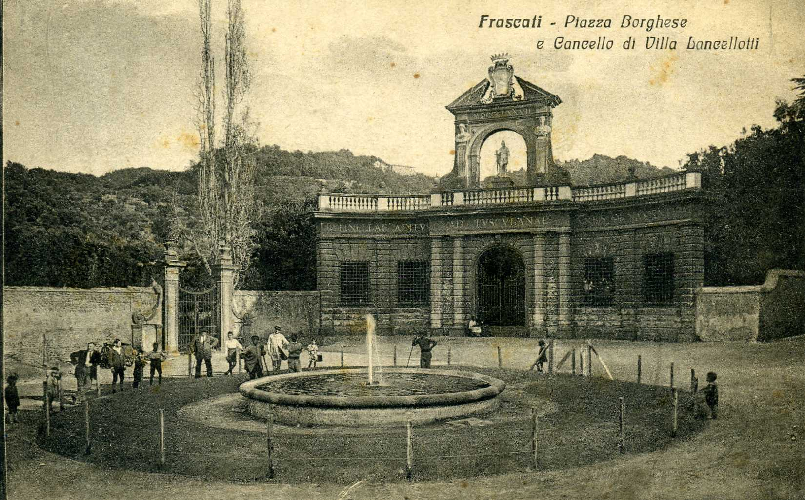 Cartolina Postale del 1927 con immagine l'ingresso della Villa Lancellotti, oggi ingresso del Parco dell'Ombrellino